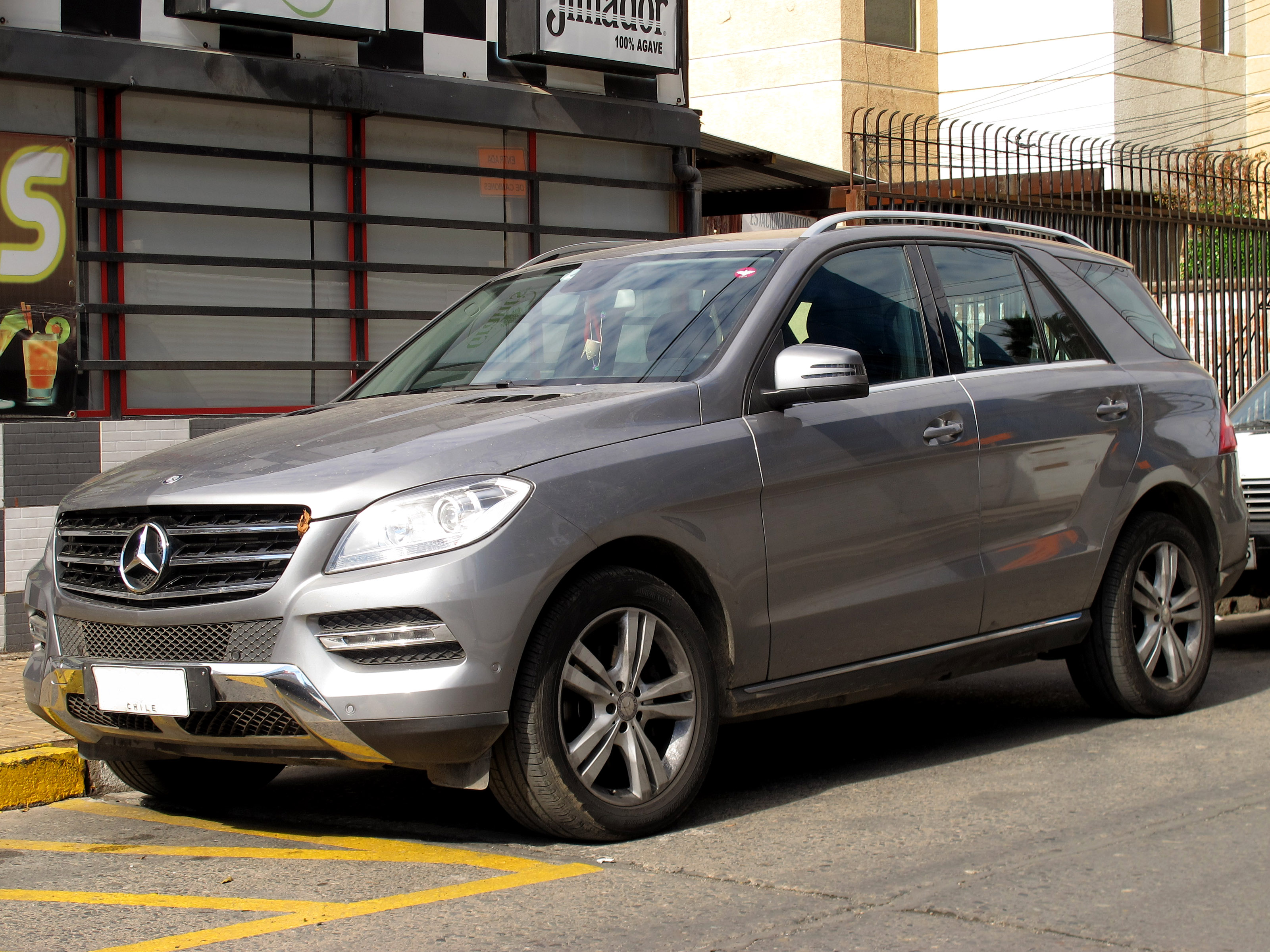 Mercedes Benz ML 250 Bluetec 2013